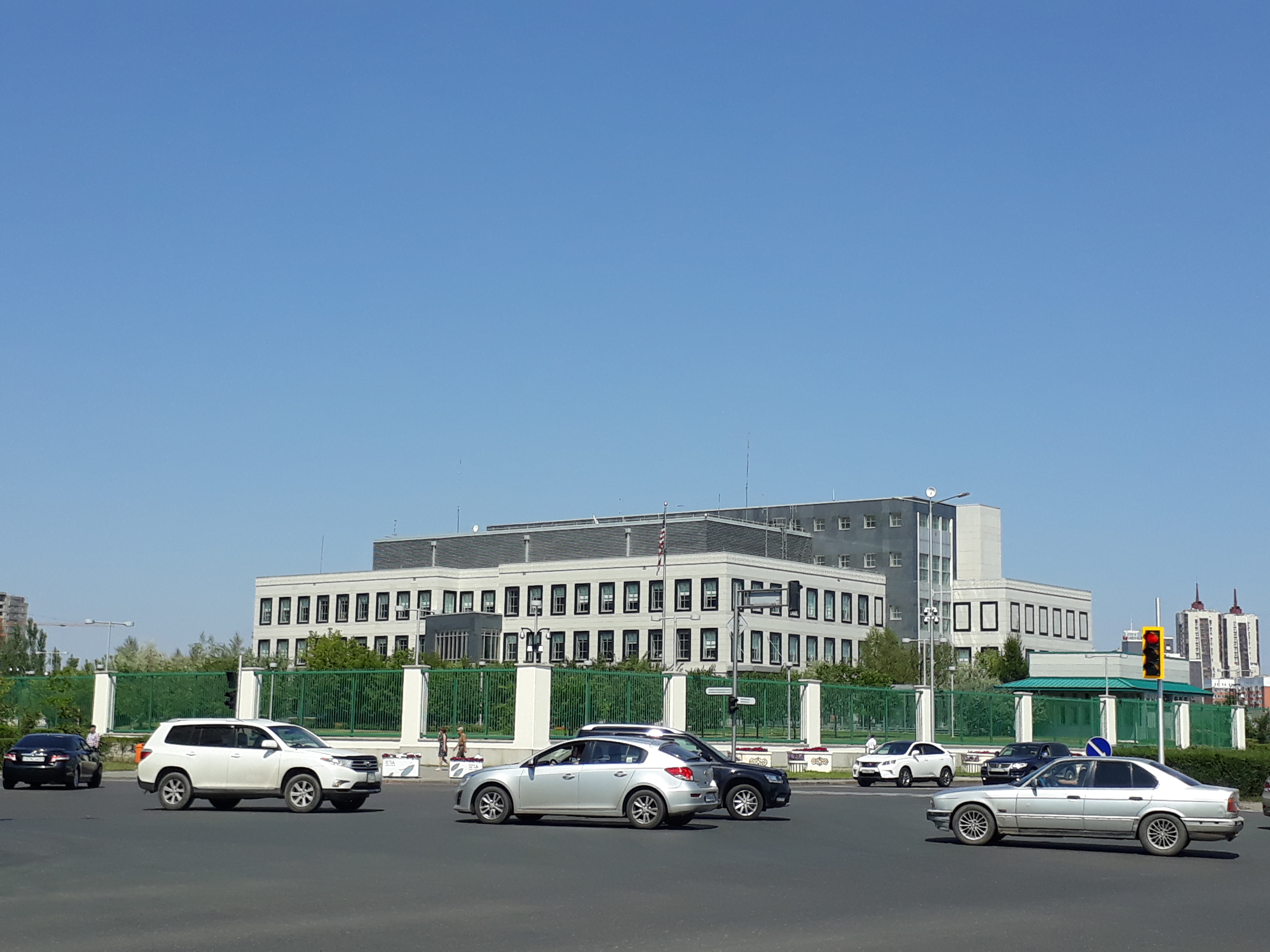 Посольство США в Нур-Султан